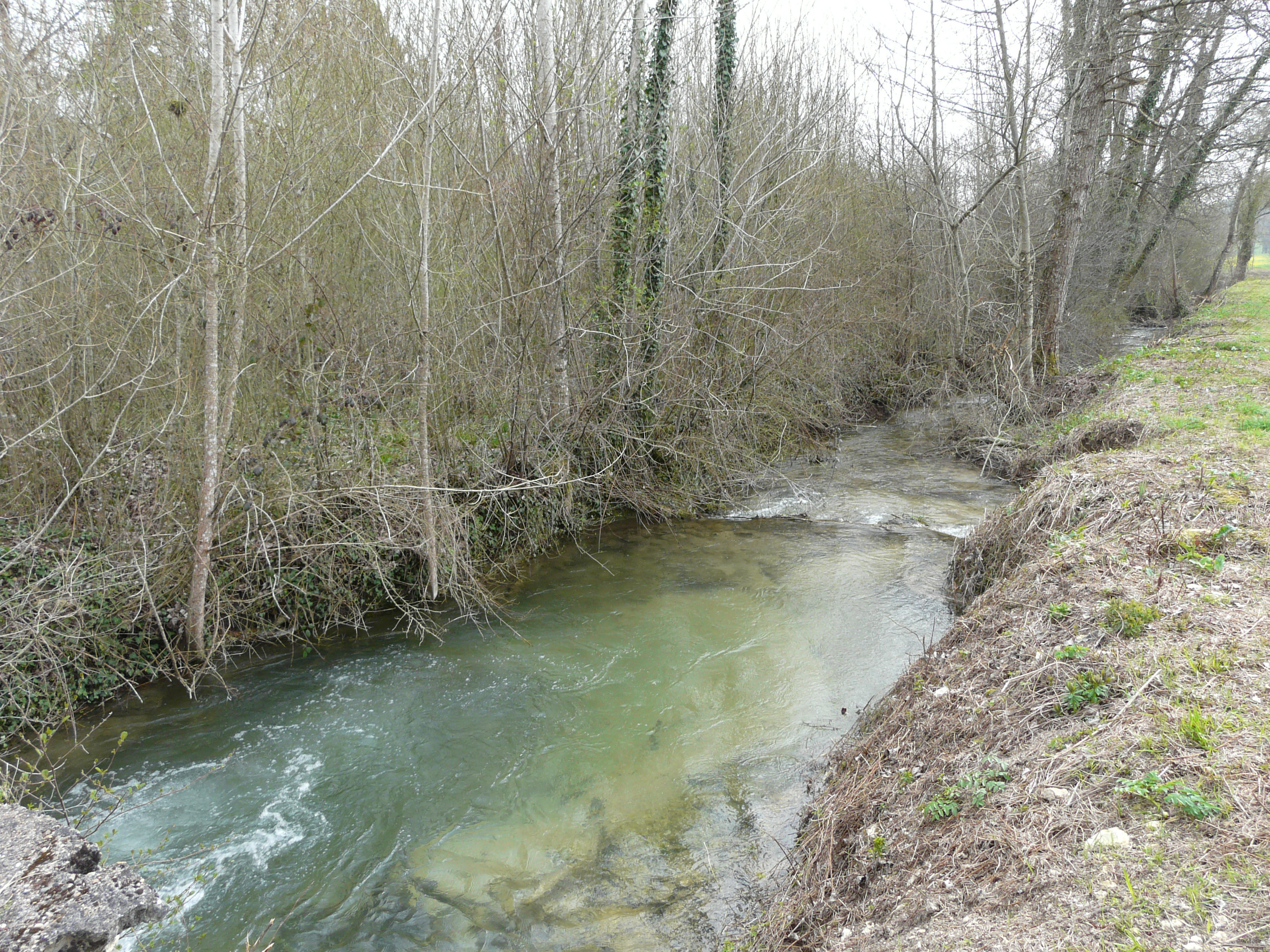 Le Caudeau à proximité du lieu-dit Guillegorce, Saint-Amand-de-Vergt, Dordogne, France. Vue prise en direction de l'aval.